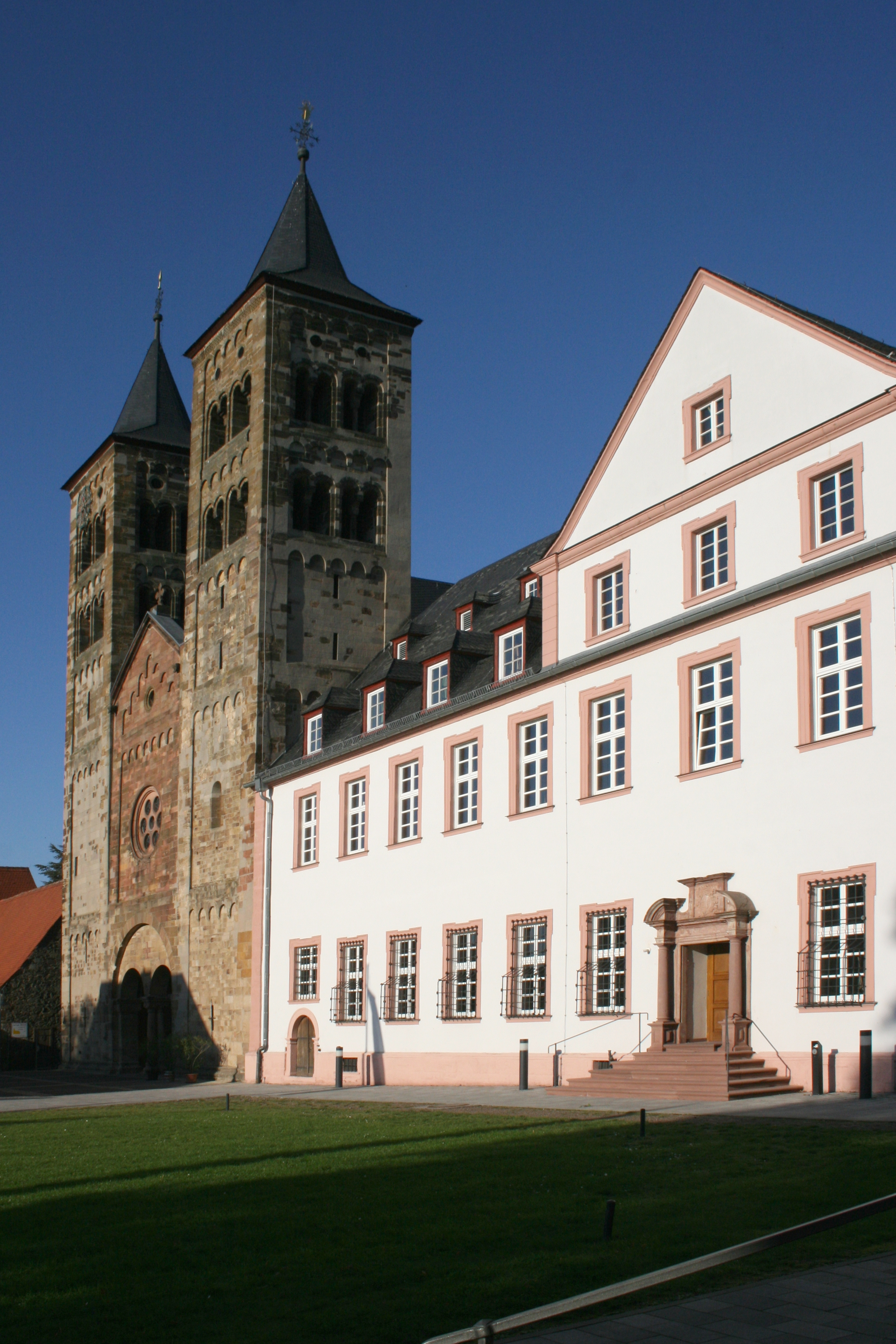 Klosterkirche und Prälatur in Ilbenstadt, Wetteraukreis.